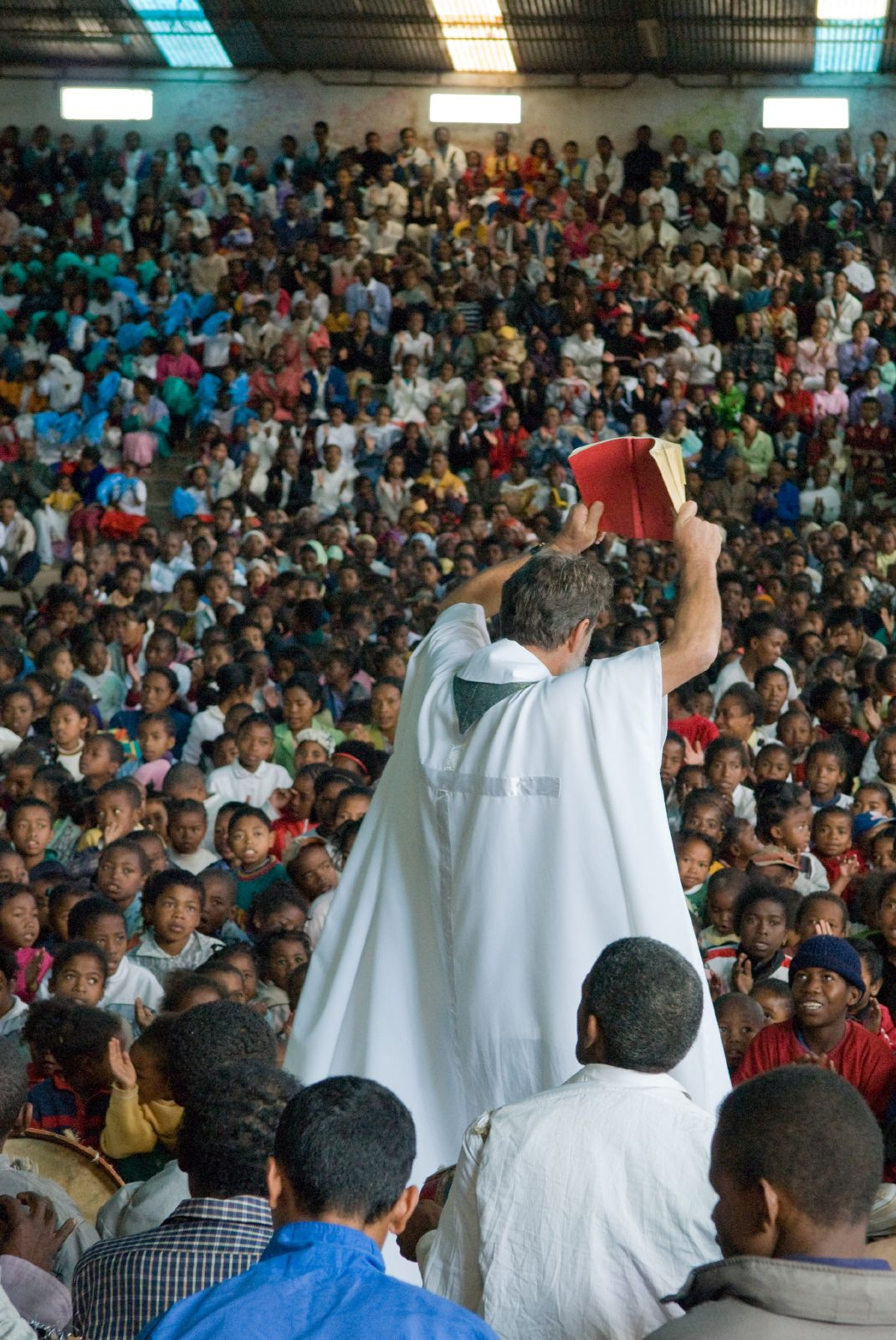 Padre Pedro Opeka, Akamasoa, Madagascar